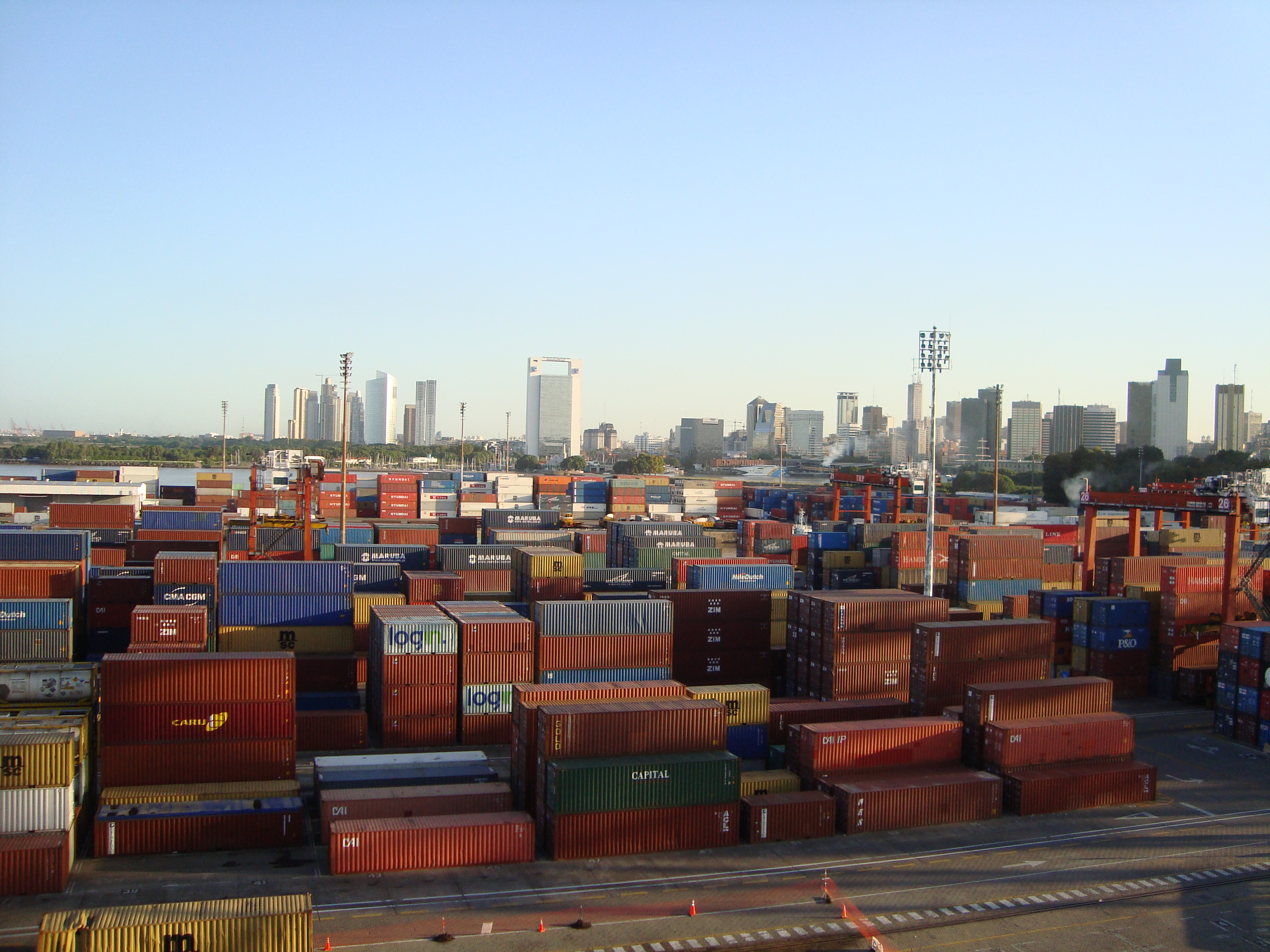 Puerto Nuevo, Buenos Aires